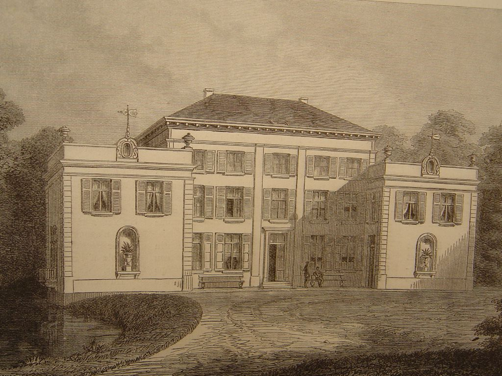 vue du chateau de M.De Meester de Ravestein à Hever près de Malines